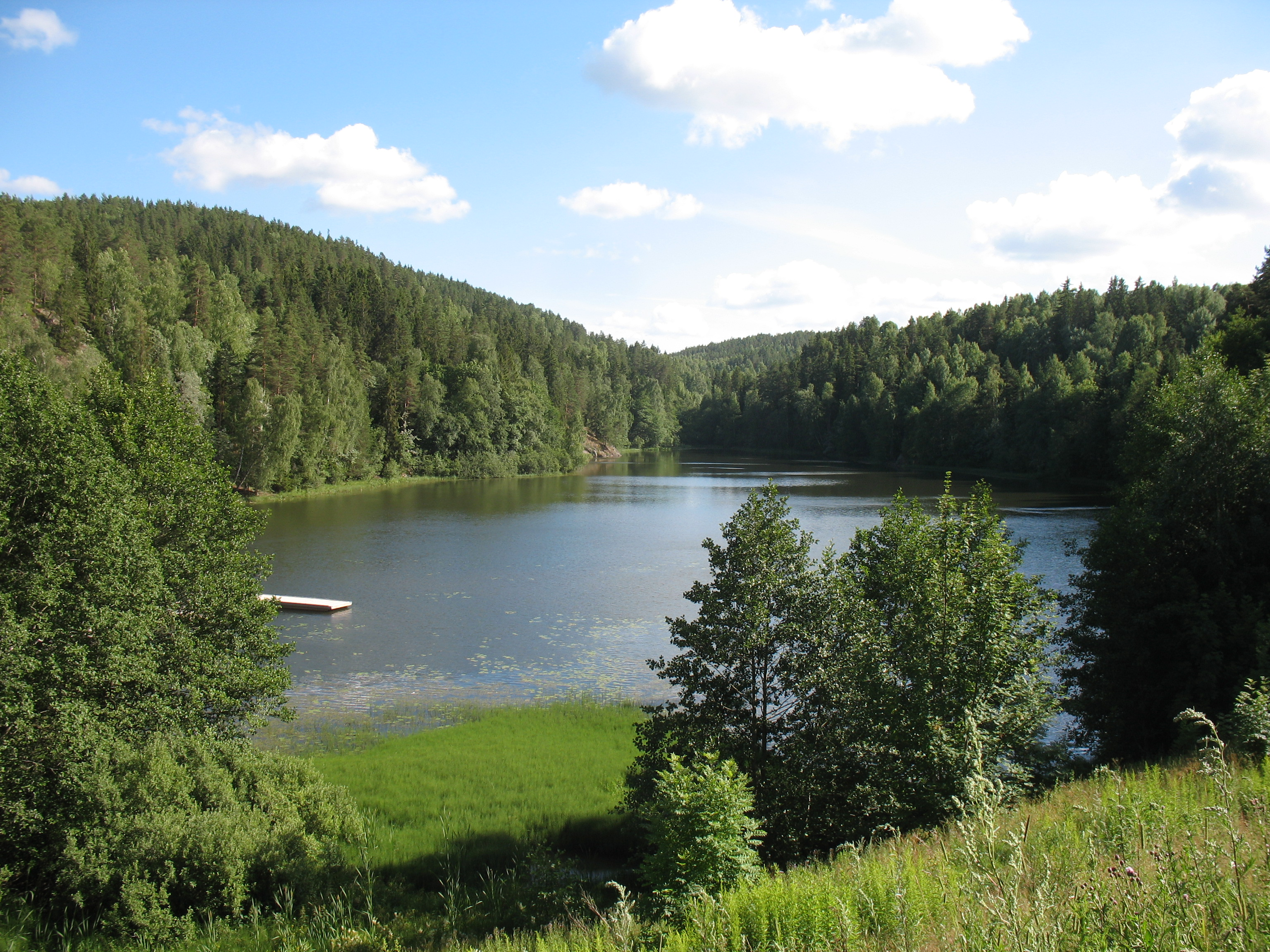 Skraperudtjern på Bogerud/Skullerud ved inngangen til Østmarka i Oslo